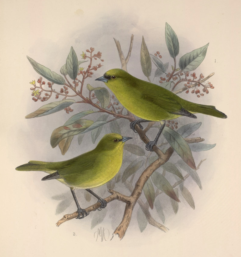 (Loxops caeruleirostris). (Wils) 1. male adult, 2. female adult ! Male AD.; 2 Female AD.